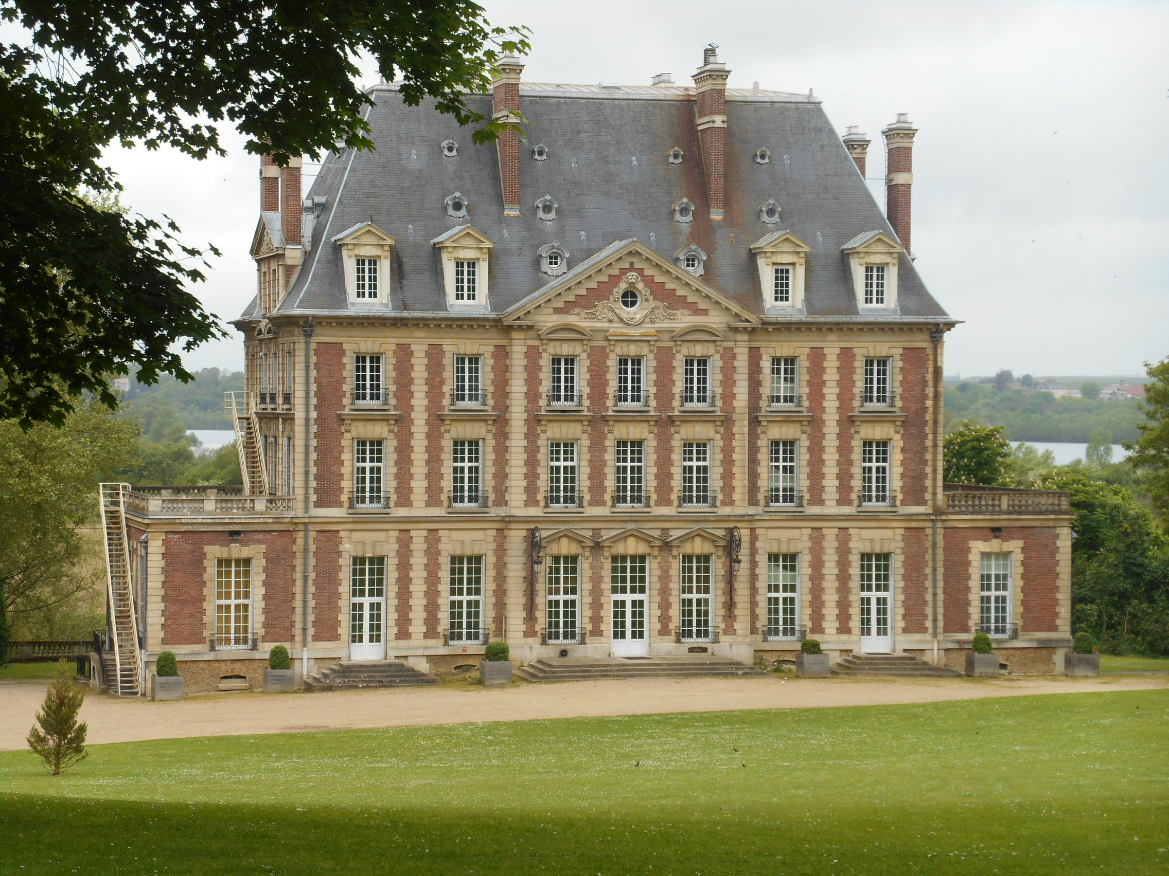 Château de Trilbardou (77)